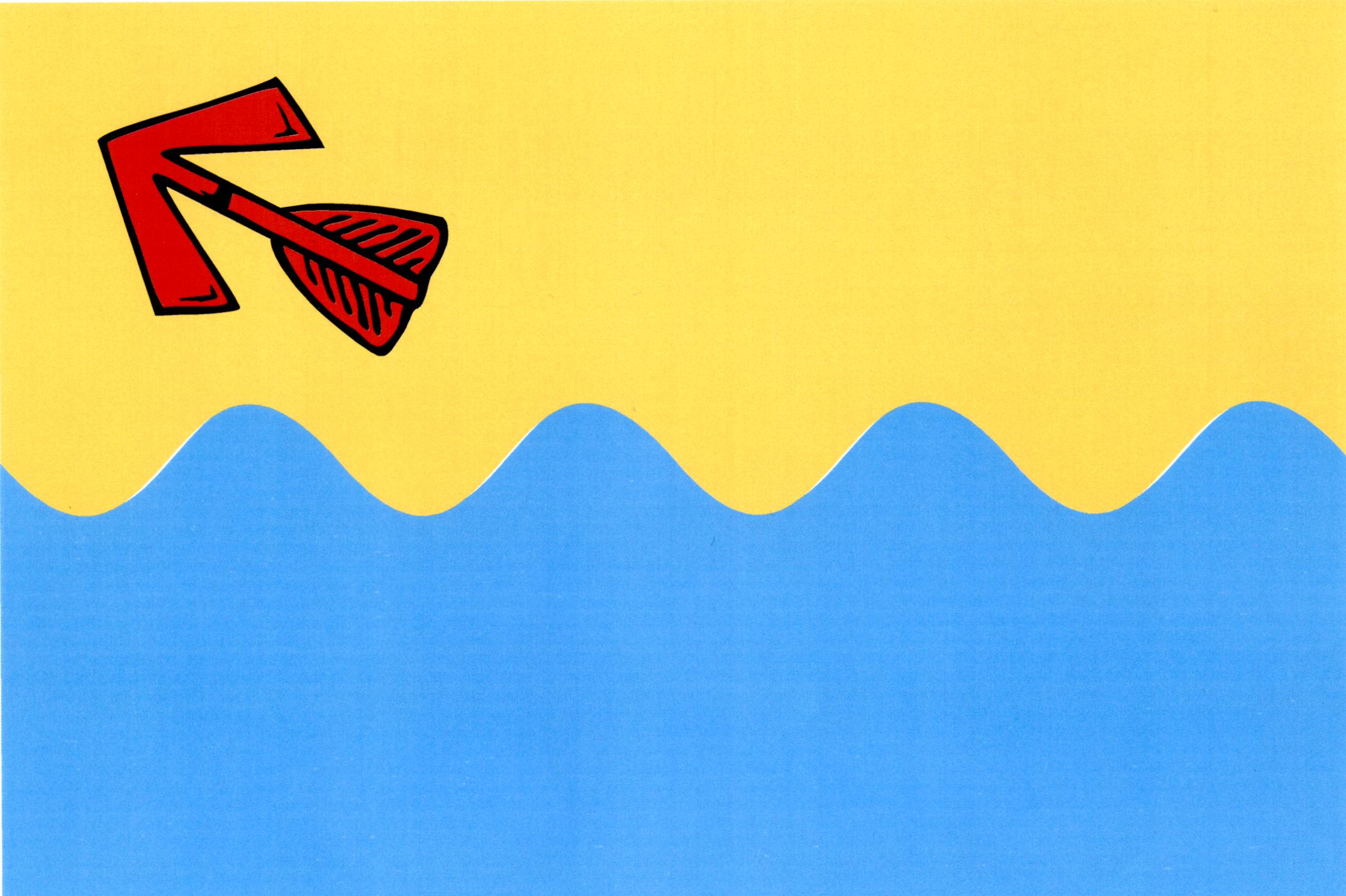 Vlajka obce Boršov nad Vltavou